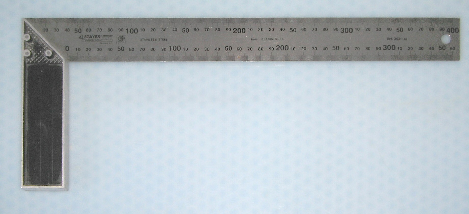 Serurista ortilo La foto estis farita de mi mem.